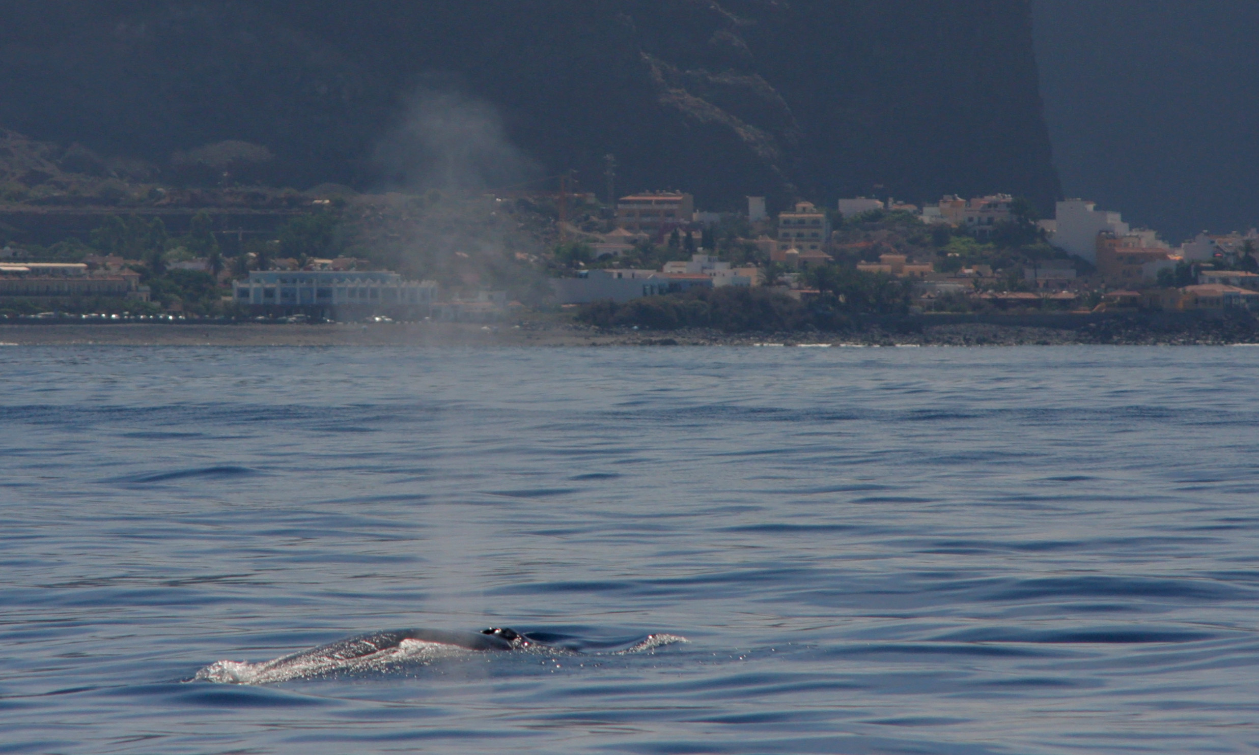 Ein Brydewal (Balaenoptera brydei) taucht vor dem Tal Valle Gran Rey (La Gomera) auf